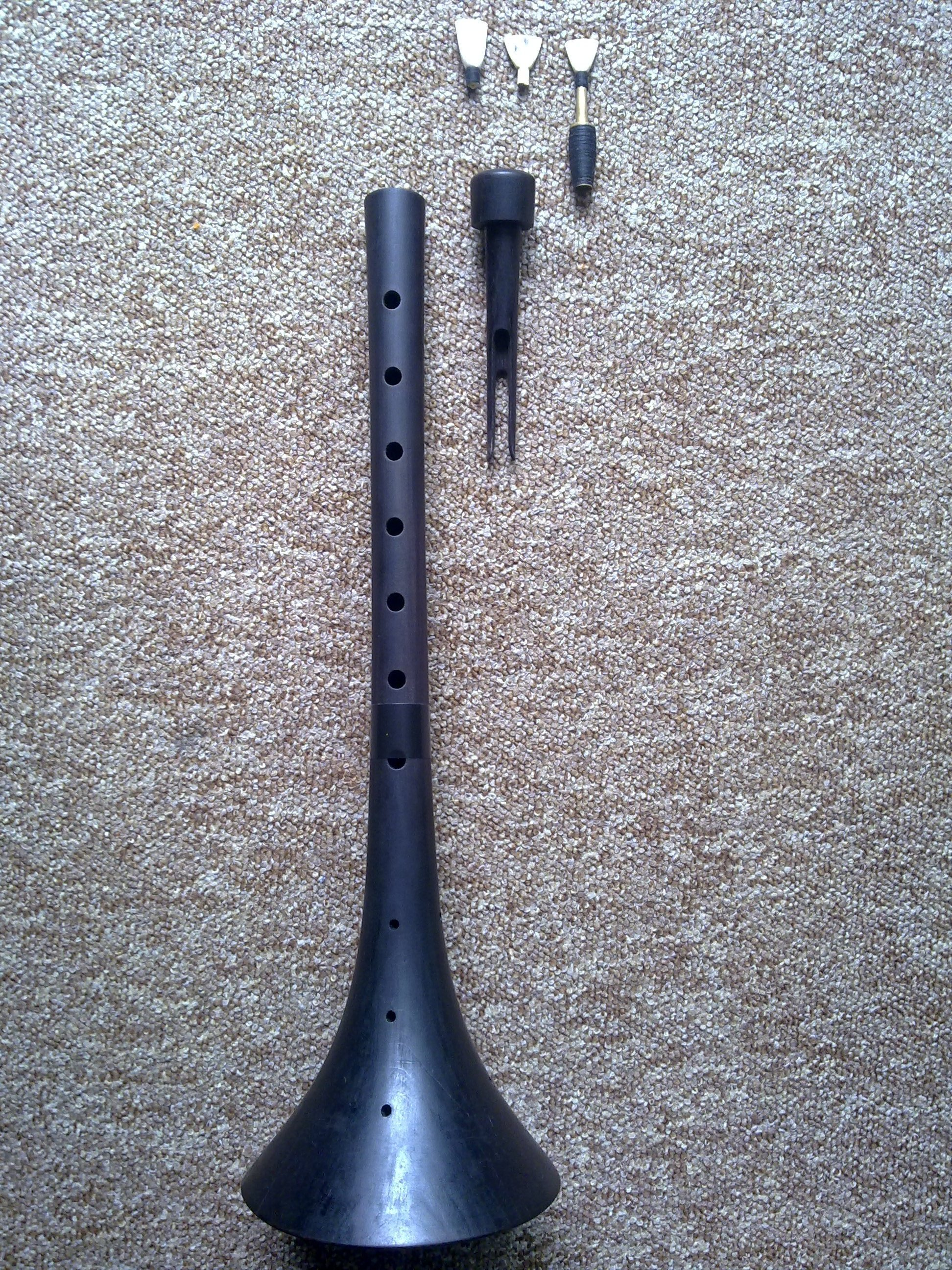 Zurna aus Grenadillholz, Zunge (dil) aus Ebenholz und Rohrblätter (kamis) unbearbeitet, beschnitten und verbrannt und an das Rohr (boru) gebunden